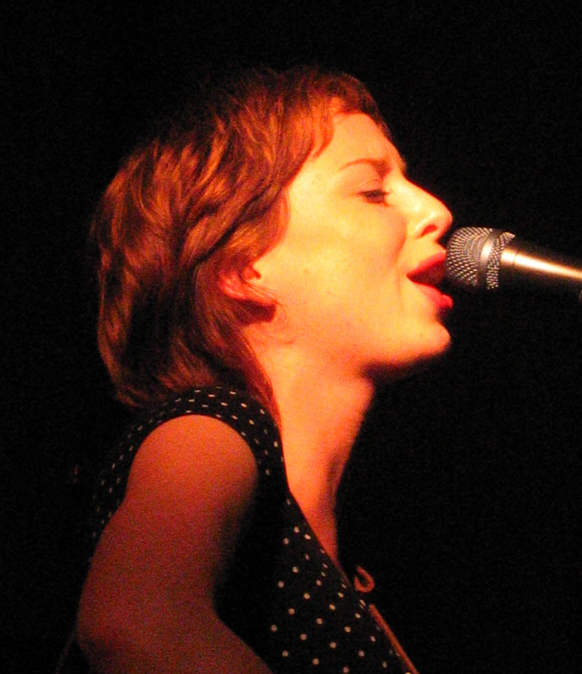 Stevie Ann live in Londen, april 2006